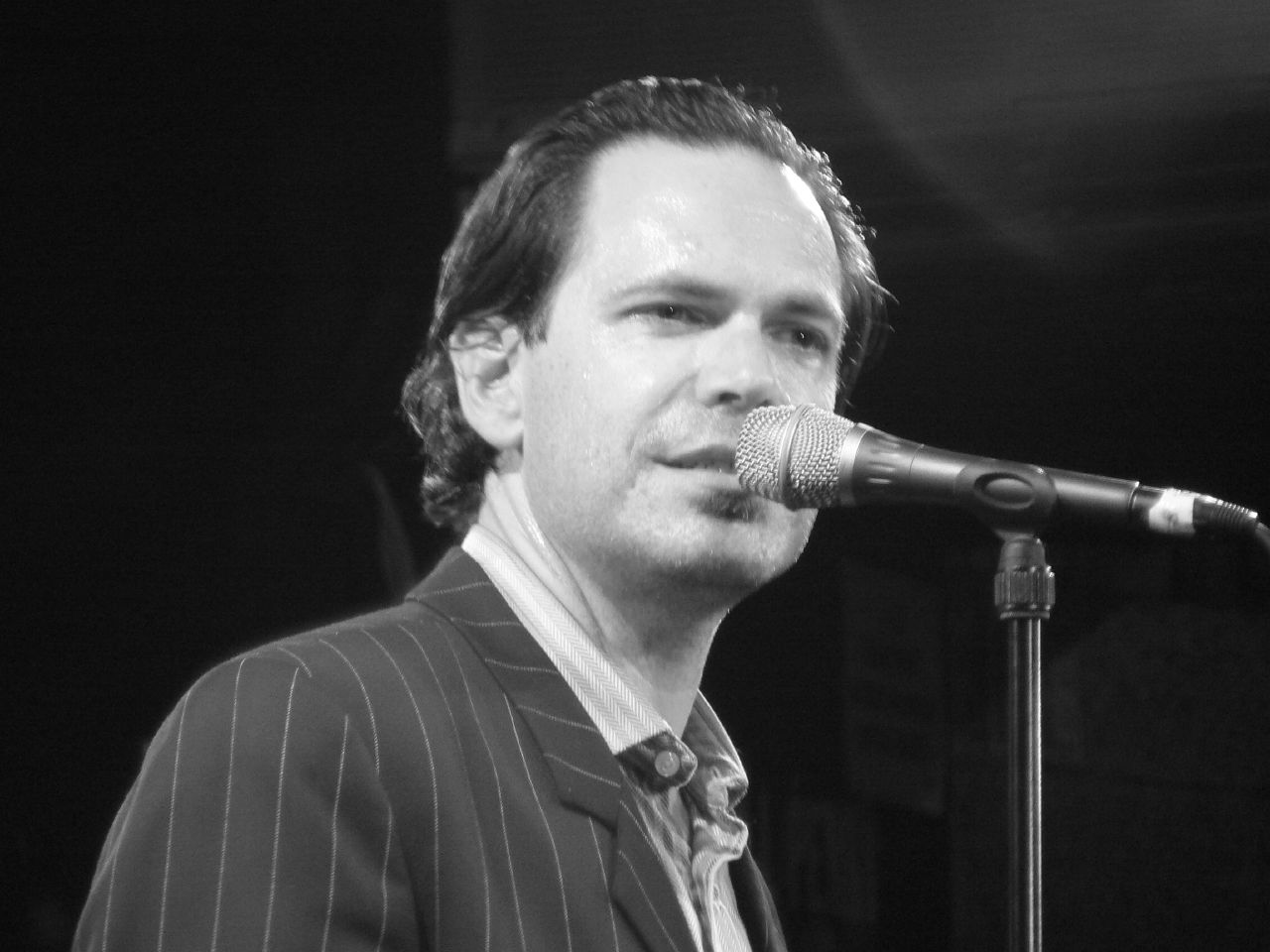 Plus de musique / more music